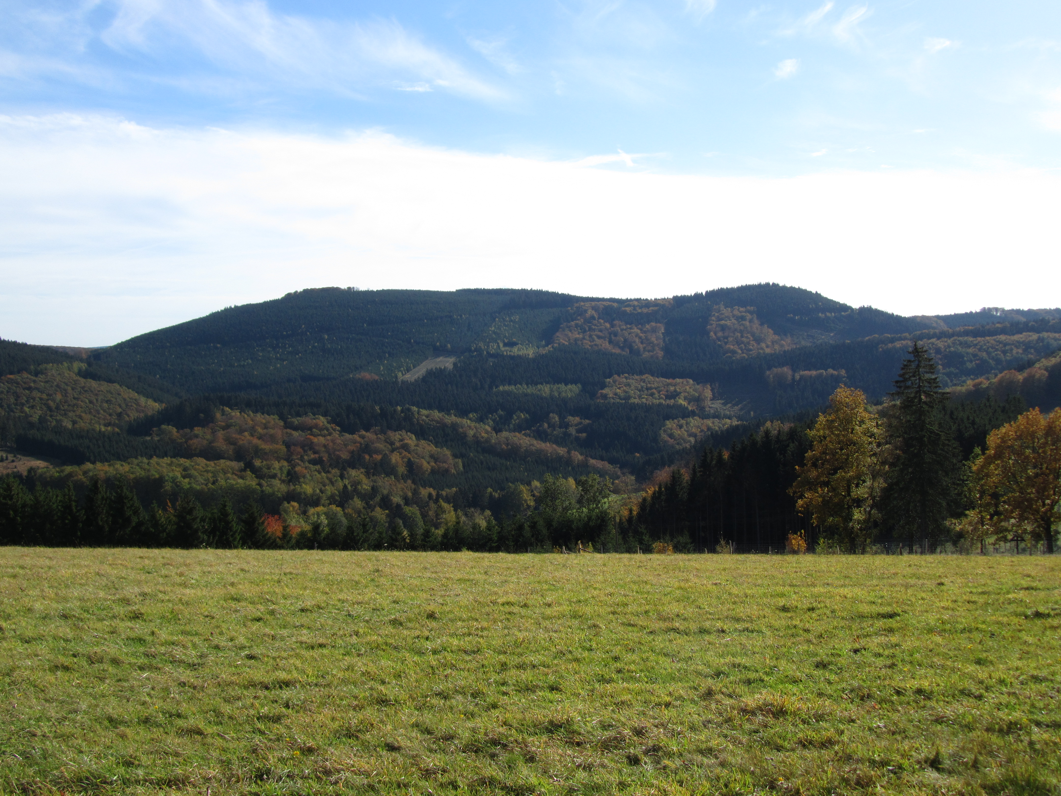 Der Himberg (688 m) in den Saalhauser Bergen im Sauerland von Norden, rechts der Hohe Lehnberg (667 m).